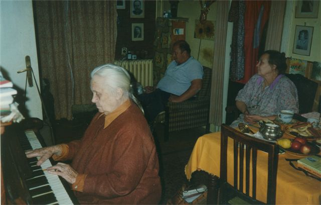 Helena Zan-Stankiewicz, Józef Stankiewicz (1936-2011) and Krystyna Stankiewicz (b. 1931)